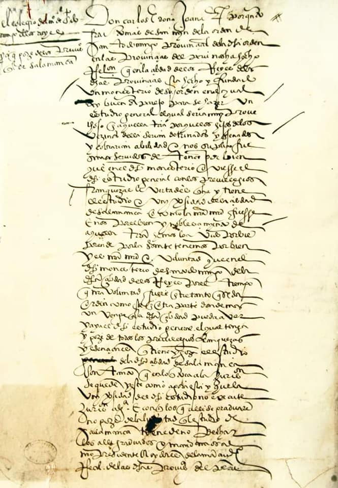 UNMSM Real Provisión de Fundación - Parte 1